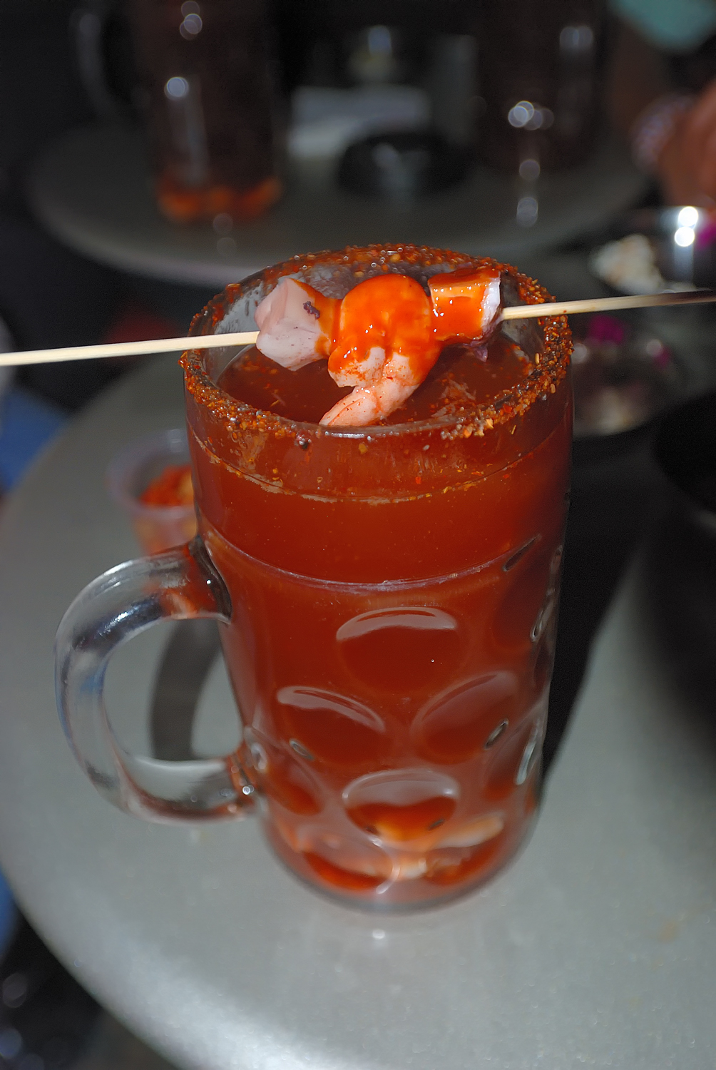 Michelada, trago mexicano